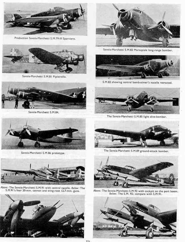 Savoia-Marchetti family